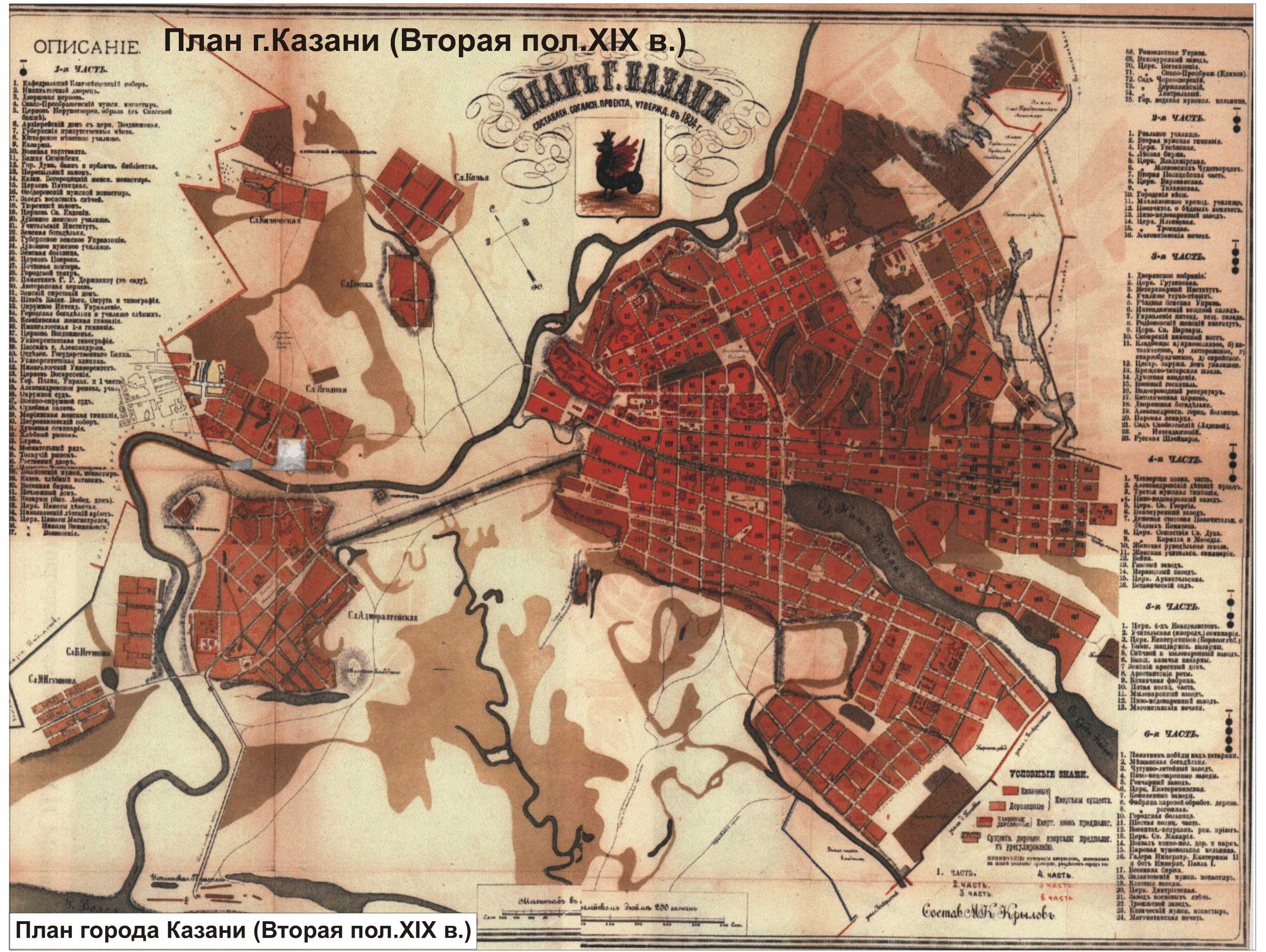 План Казани по проекту 1884 года.